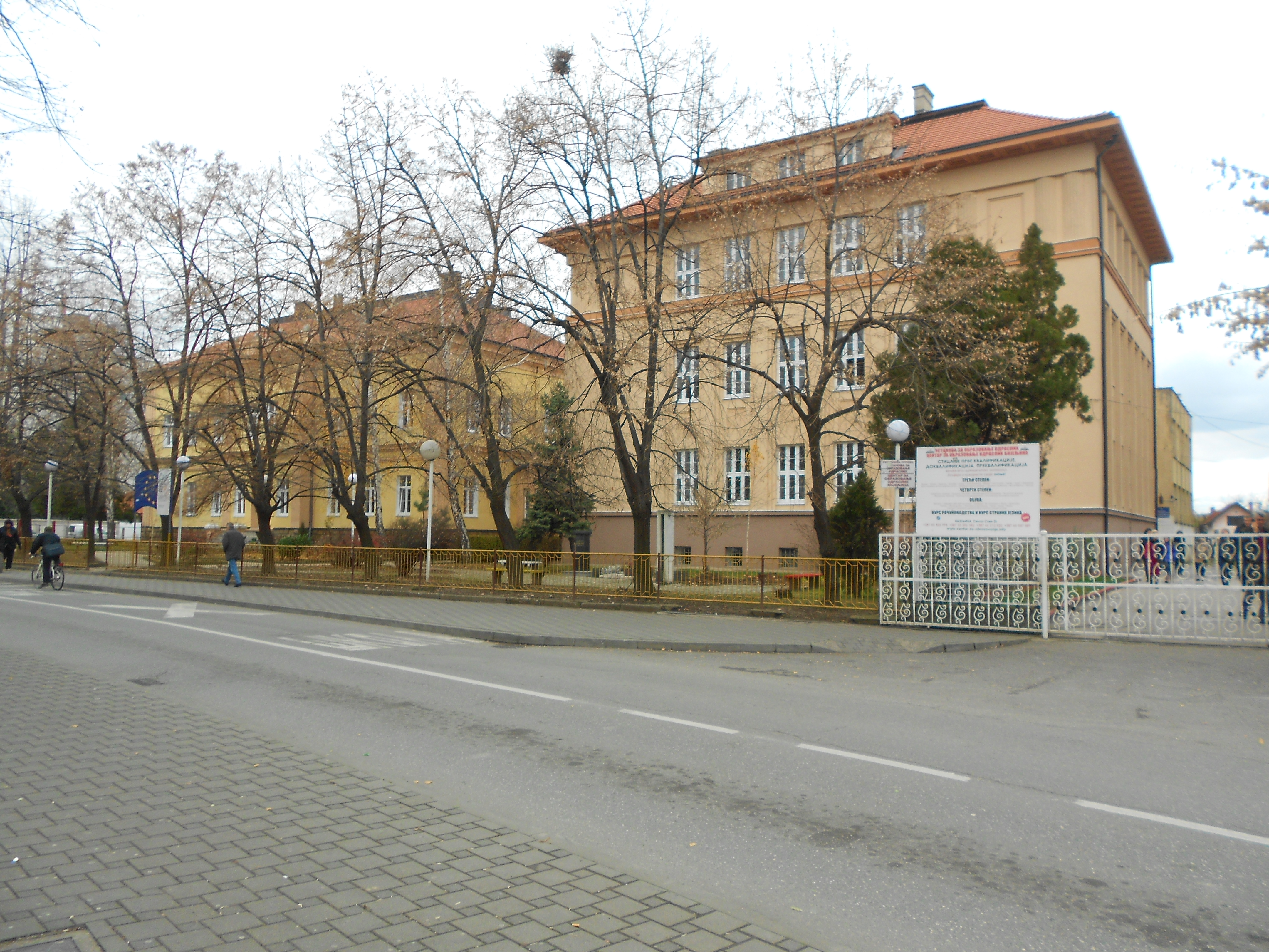 ОШ Свети Сава у Бијељини